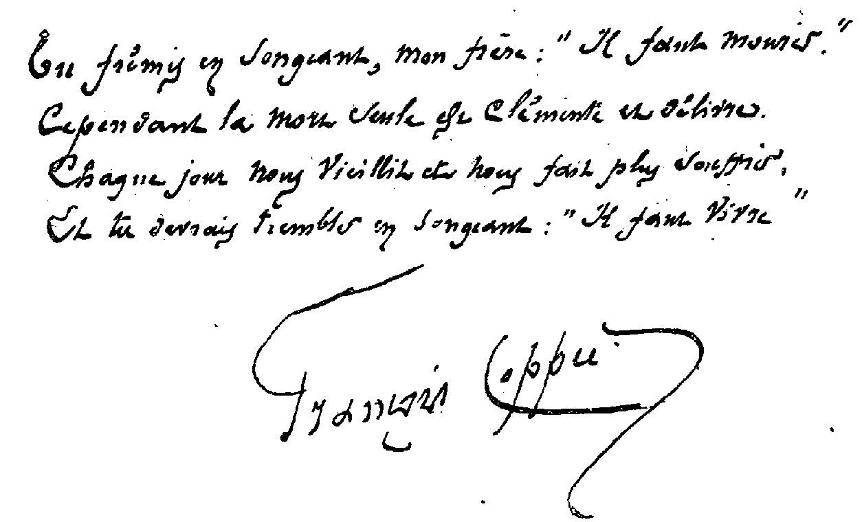 Tu frémis en songeant, mon frère... par François Coppée (1842-1908)